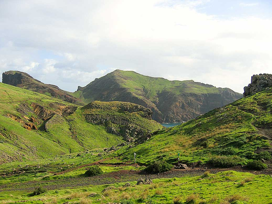 Punta de São Lourenço